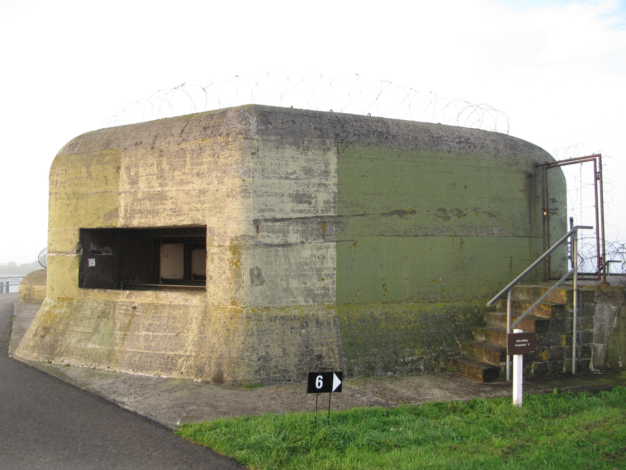 RM516501 - Kornwerderzand (foto 3).jpg